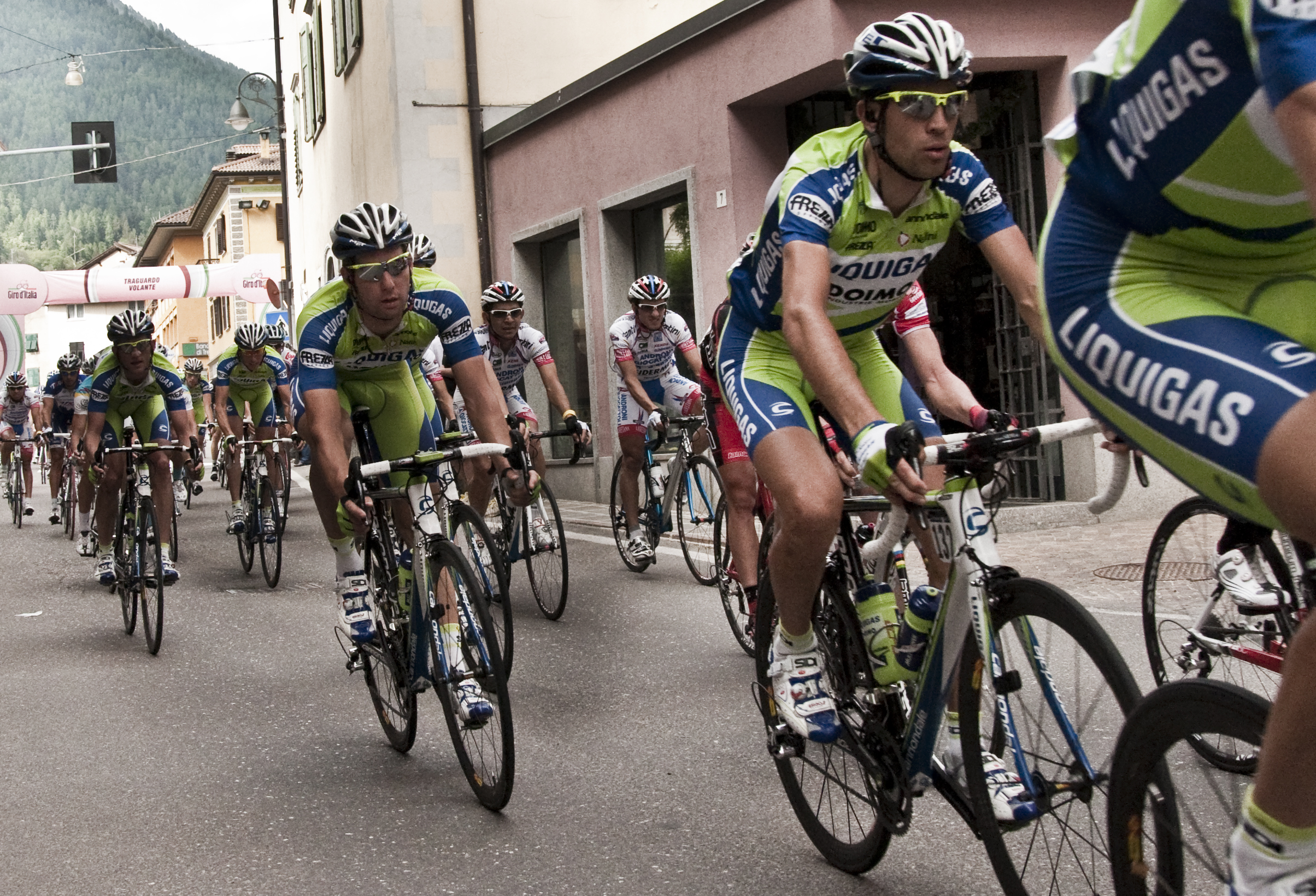 A destra, visibile, Vincenzo Nibali, la grande speranza del ciclismo italiano, pettorina 132 a questo giro, alla sua ruota un non-identificato e ancora dietro Vanotti. Tecnicamente, accanto Nibali dovrebbe esserci Ivan Basso, "infotografabile" ieri. A meno che non sia ancora dietro (posizione strana per un capitano) alla sinistra di Vanotti, nascosto. O il Liquigas visibile "in fondo".